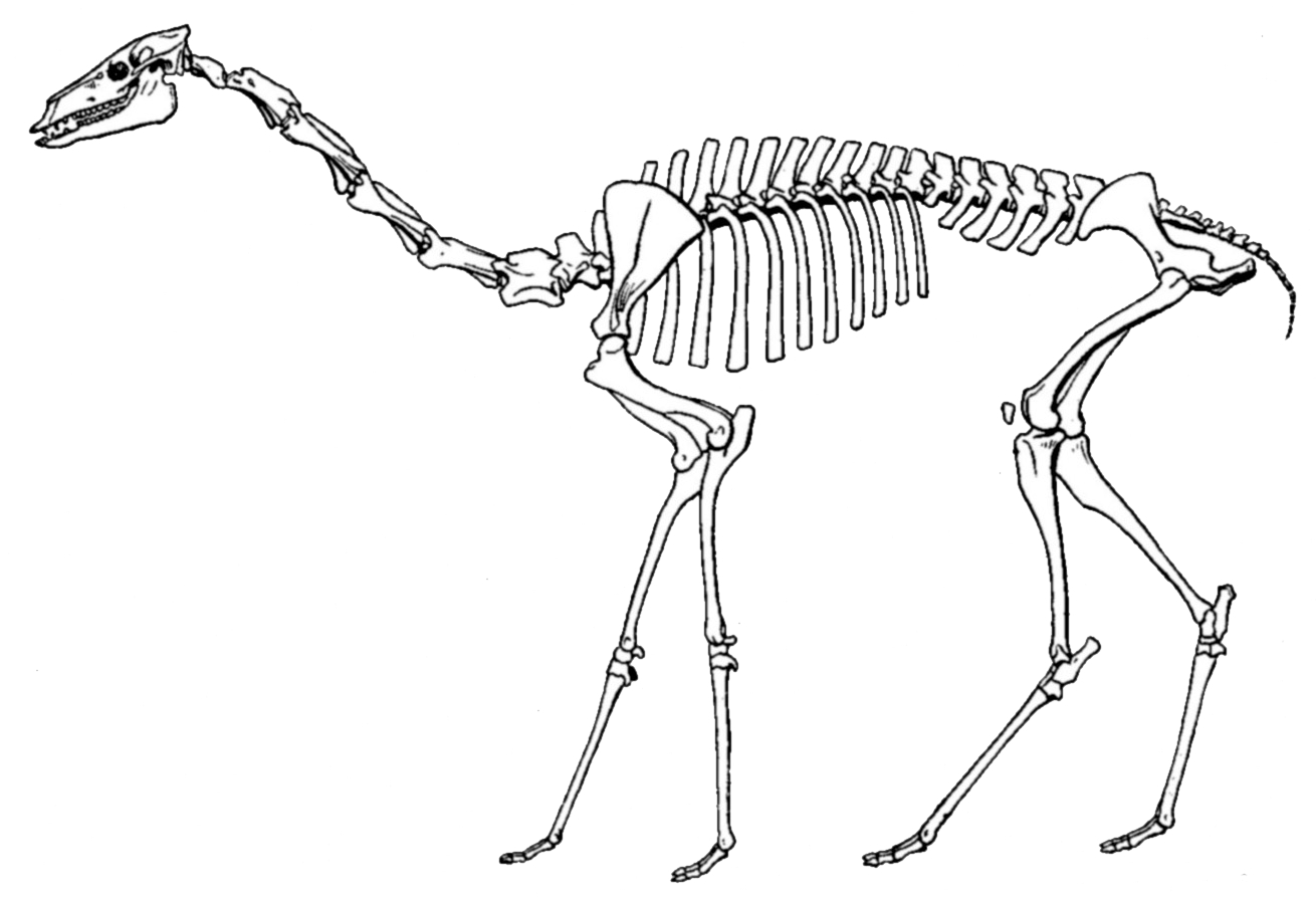 Oxydactylus skeleton.